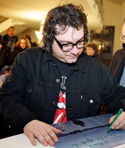 Remo Anzovino mentre firma un vinile dopo un concerto a Udine nel gennaio 2013. Foto scattata da Simone Di Luca.